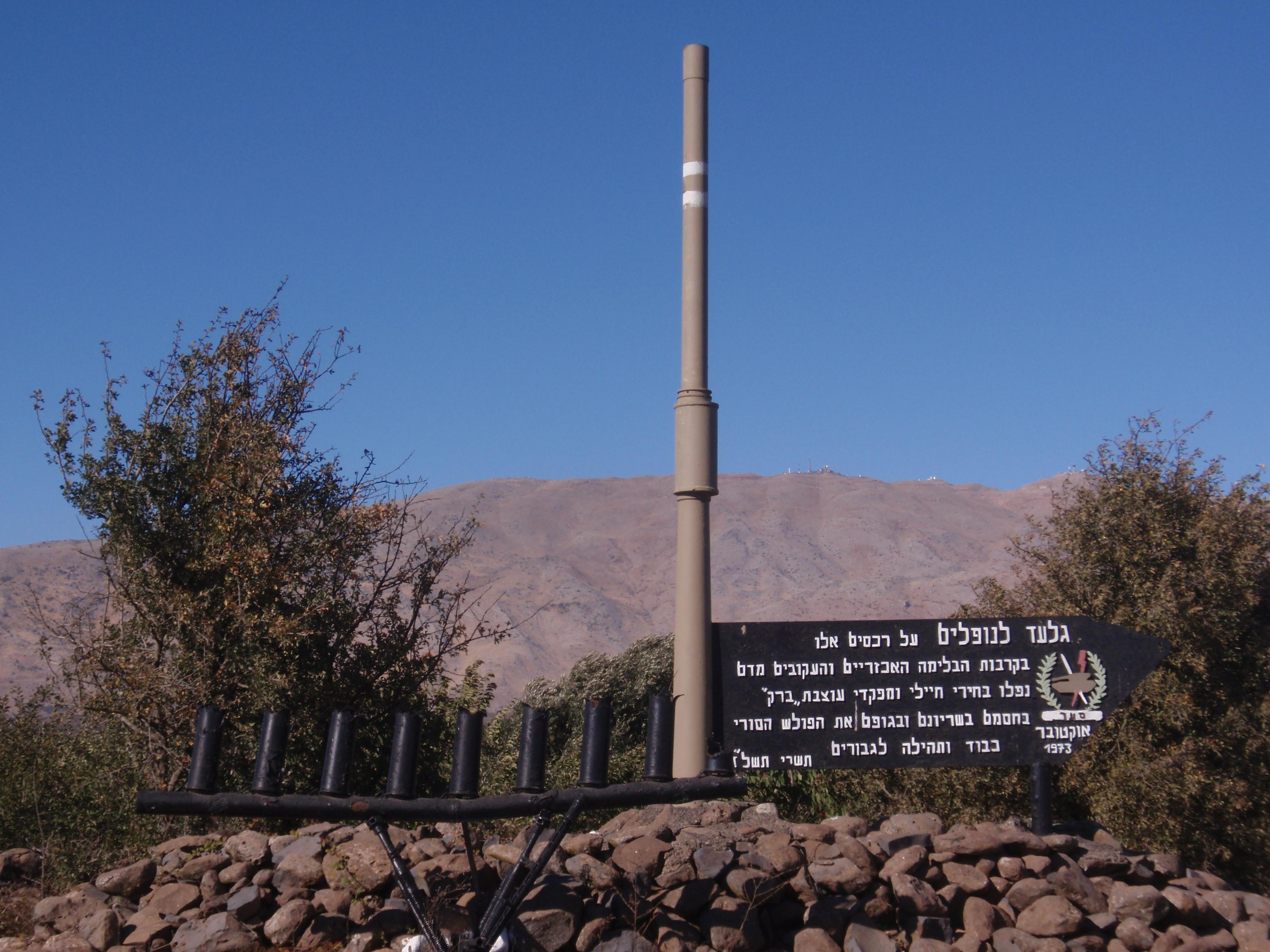 A memorial to Sa'ar battalion soldiers, who were killed during Yom Kippur war